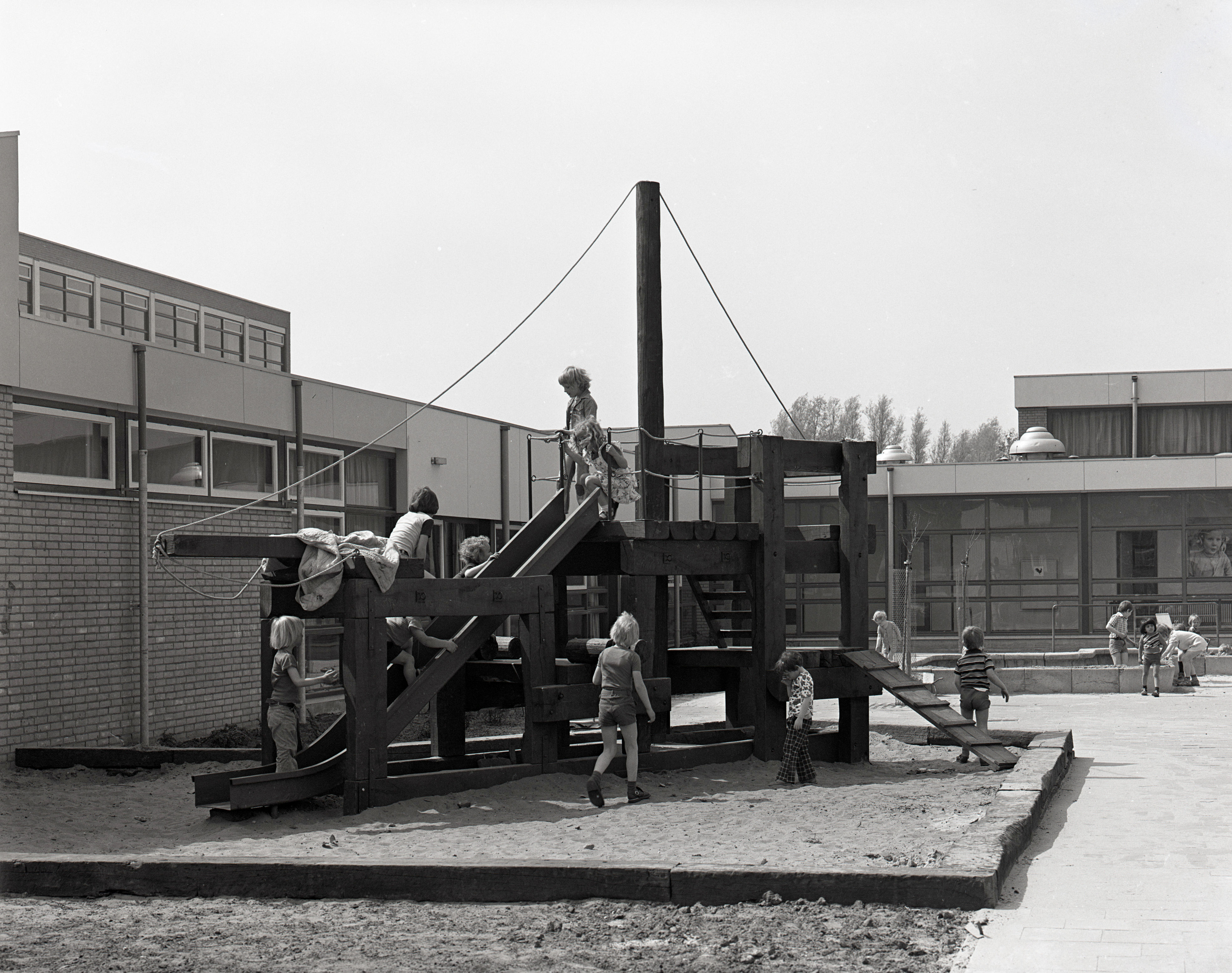 De speelplastiek "Het schip" bij de Bertha Mullerschool (Santa Cruzdreef 30, openbare school voor slechthorende kinderen en voor kinderen met spraak-/taalmoeilijkheden) te Utrecht. Het werk werd in 1975 gemaakt door Geer Steyn.